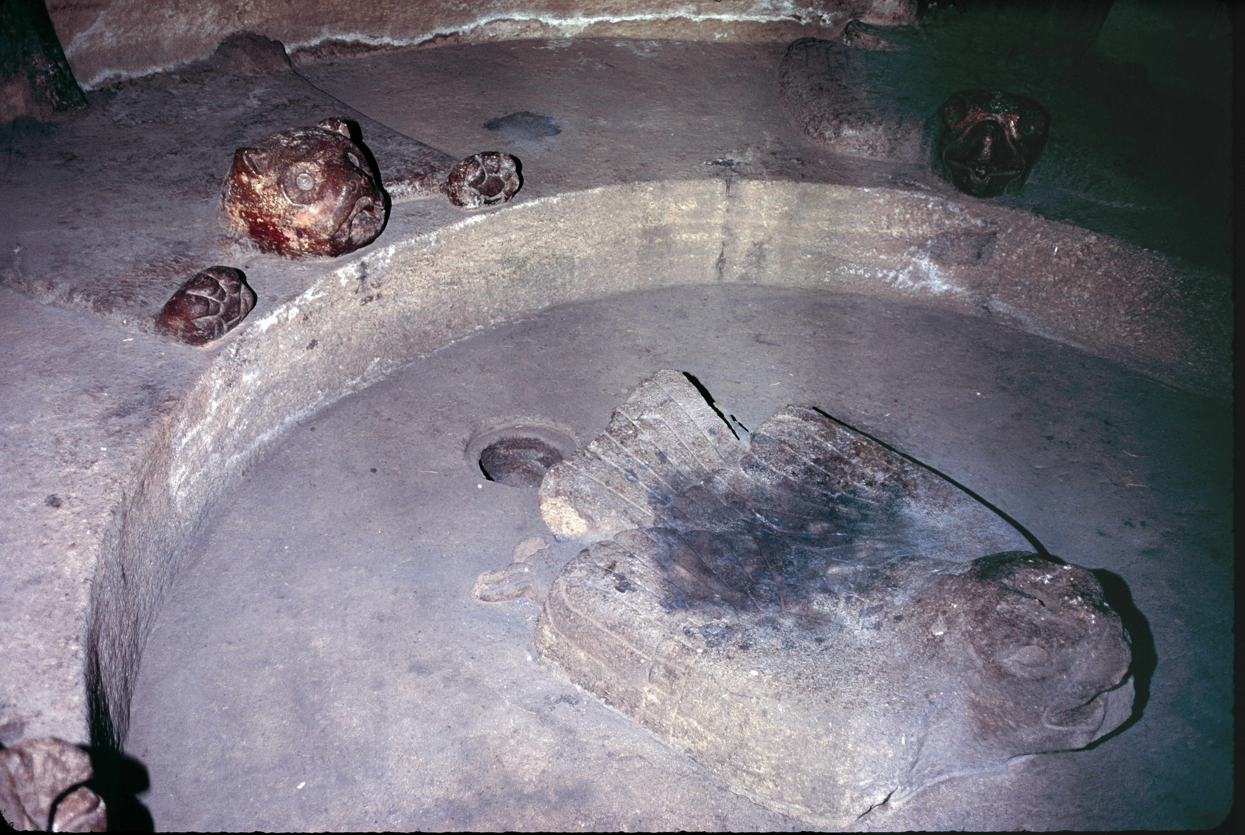 Malinalco, Estado de México, Mexiko: Innenraum des Gebäudes 1